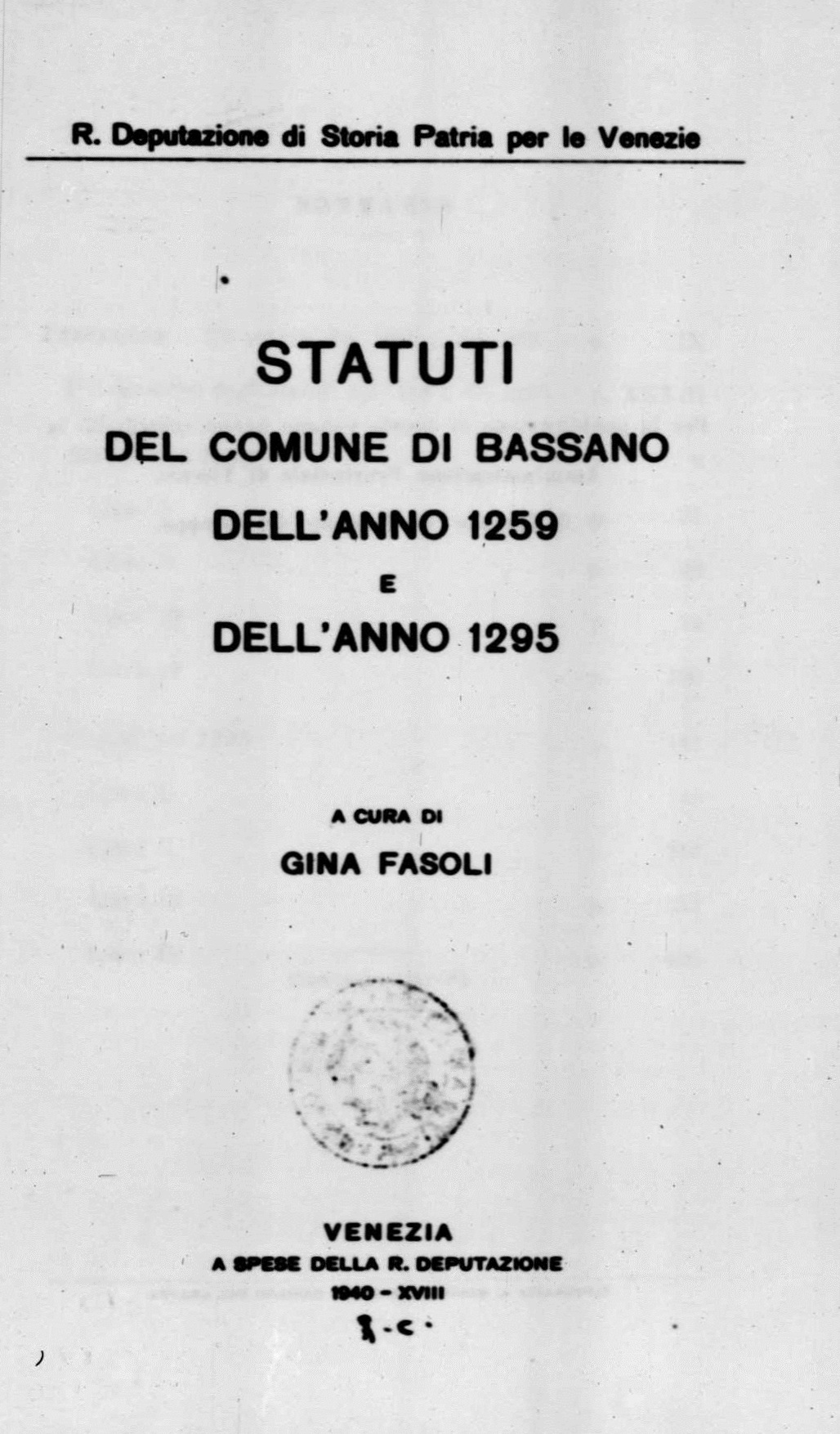 Frontespizio